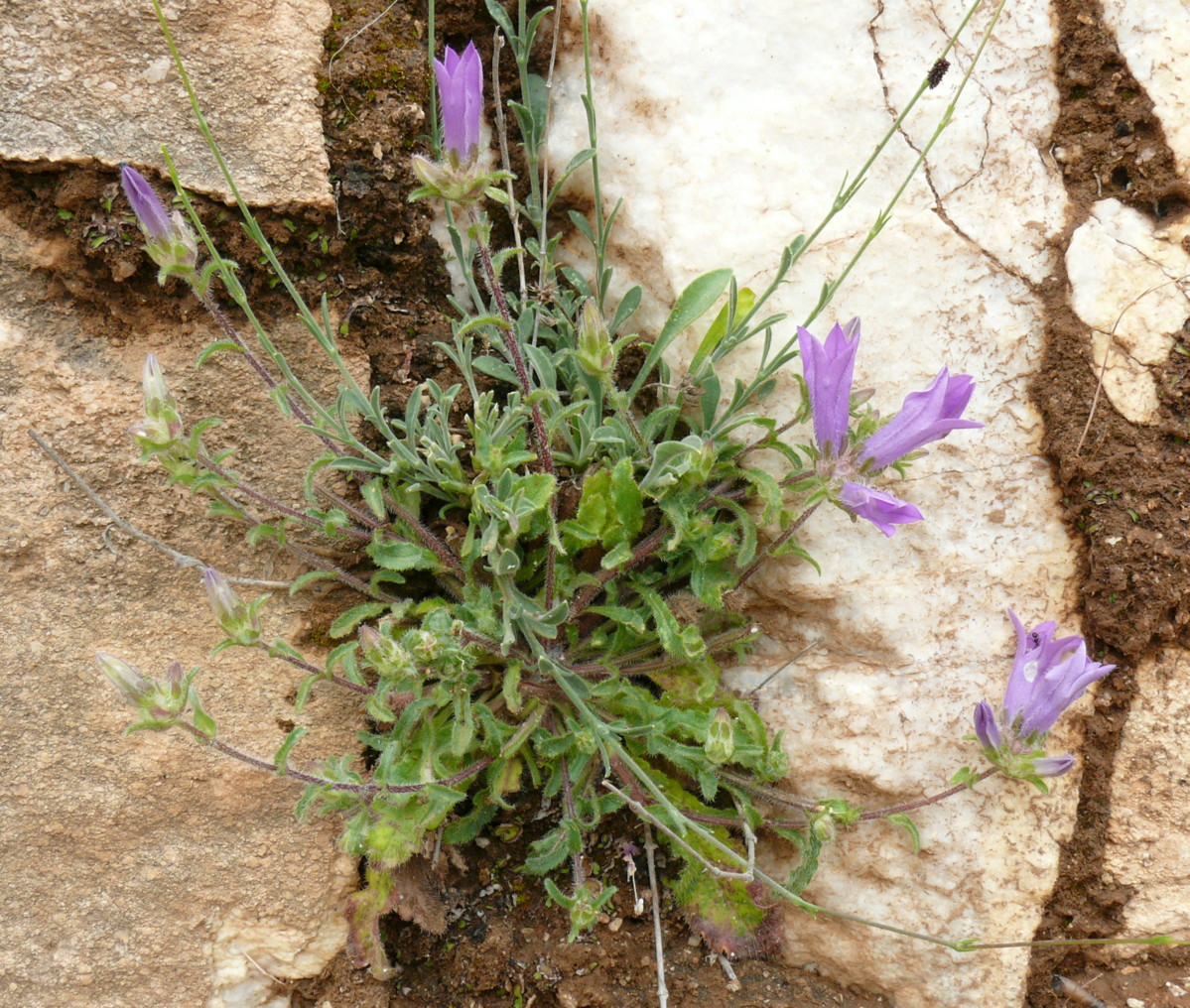 Campanula lingulata, Photo from Thasos